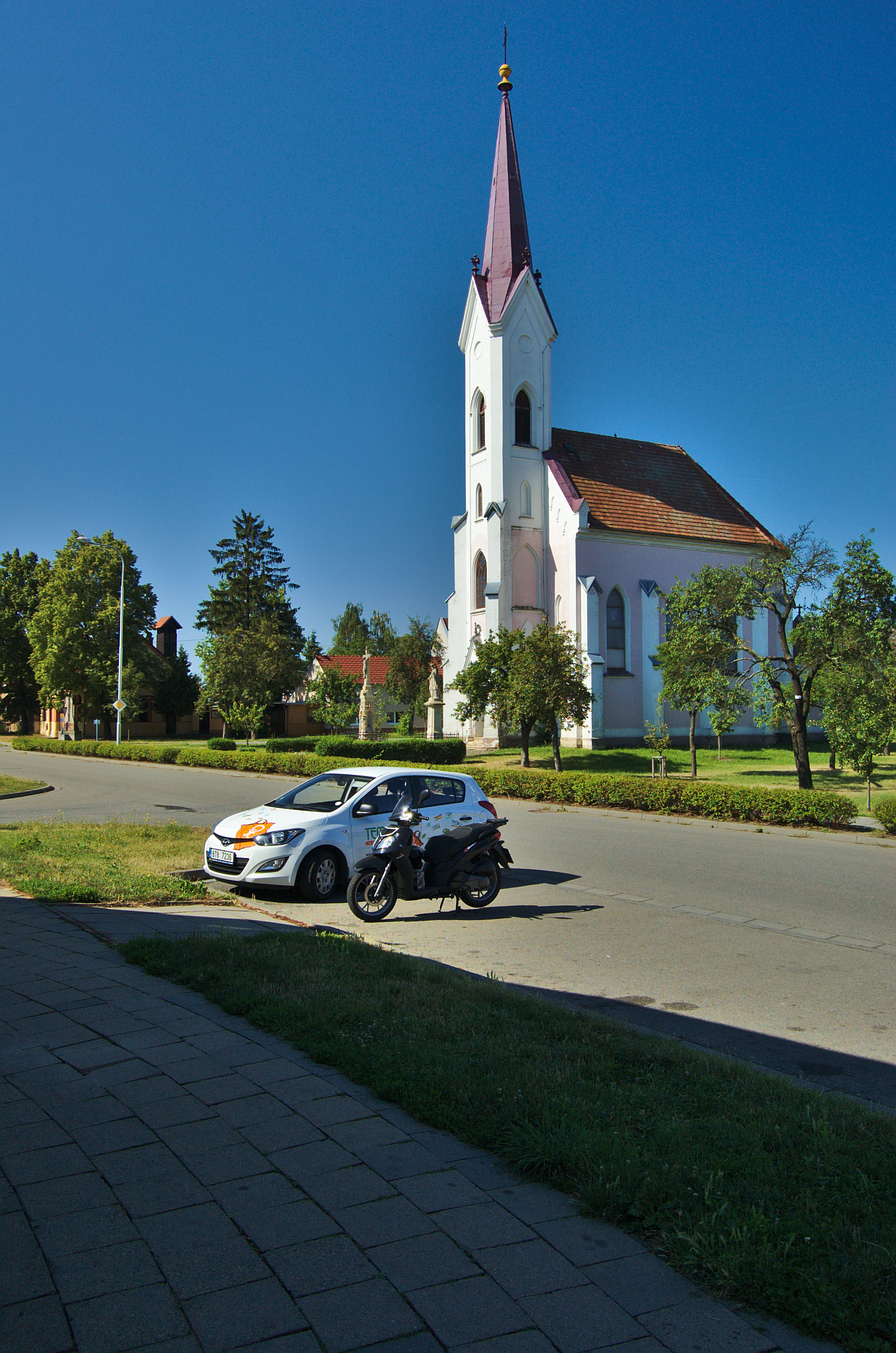 Kostel svatého Josefa, Krasice, Prostějov